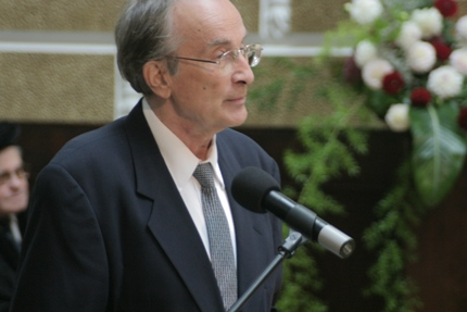 Helmuts Vinters LU 85. gadskārtai veltītajā Senāta svinīgajā sēdē